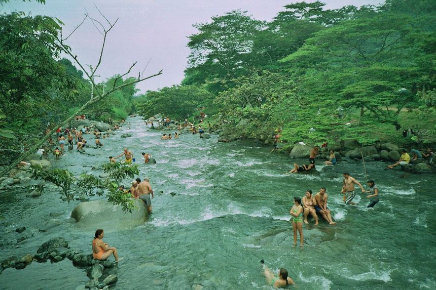 Río Pance. Cali, Colombia